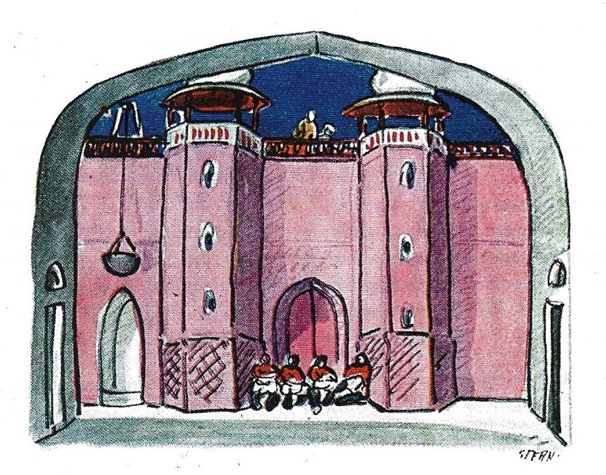 Dessin d'Ernst Stern pour la scène "Devant le harem" dans Sumurûn de Friedrich Freksa aux Kammerspiele en 1910